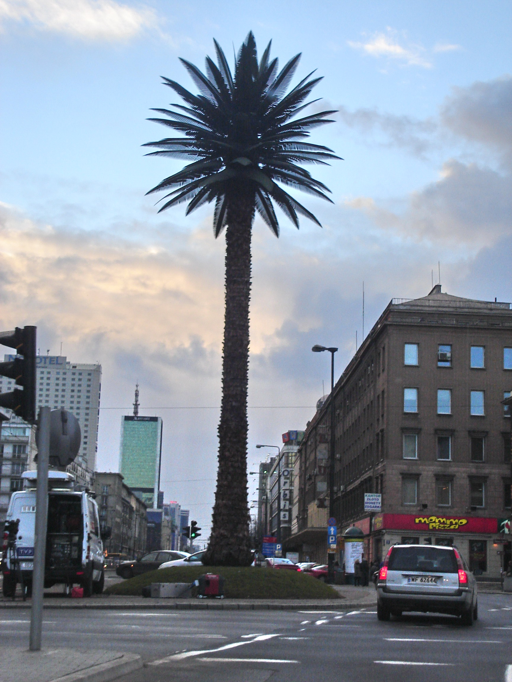 Warsaw Palm - Jerozolimskie Av.